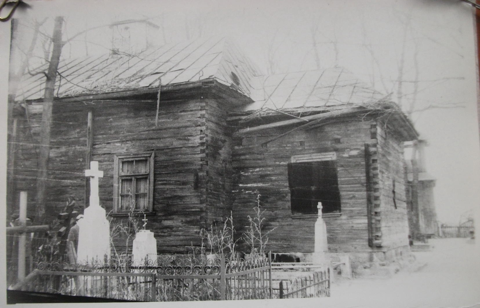 Беларуская (тарашкевіца): Спаса-Прэабражэнская царква (Пружаны)